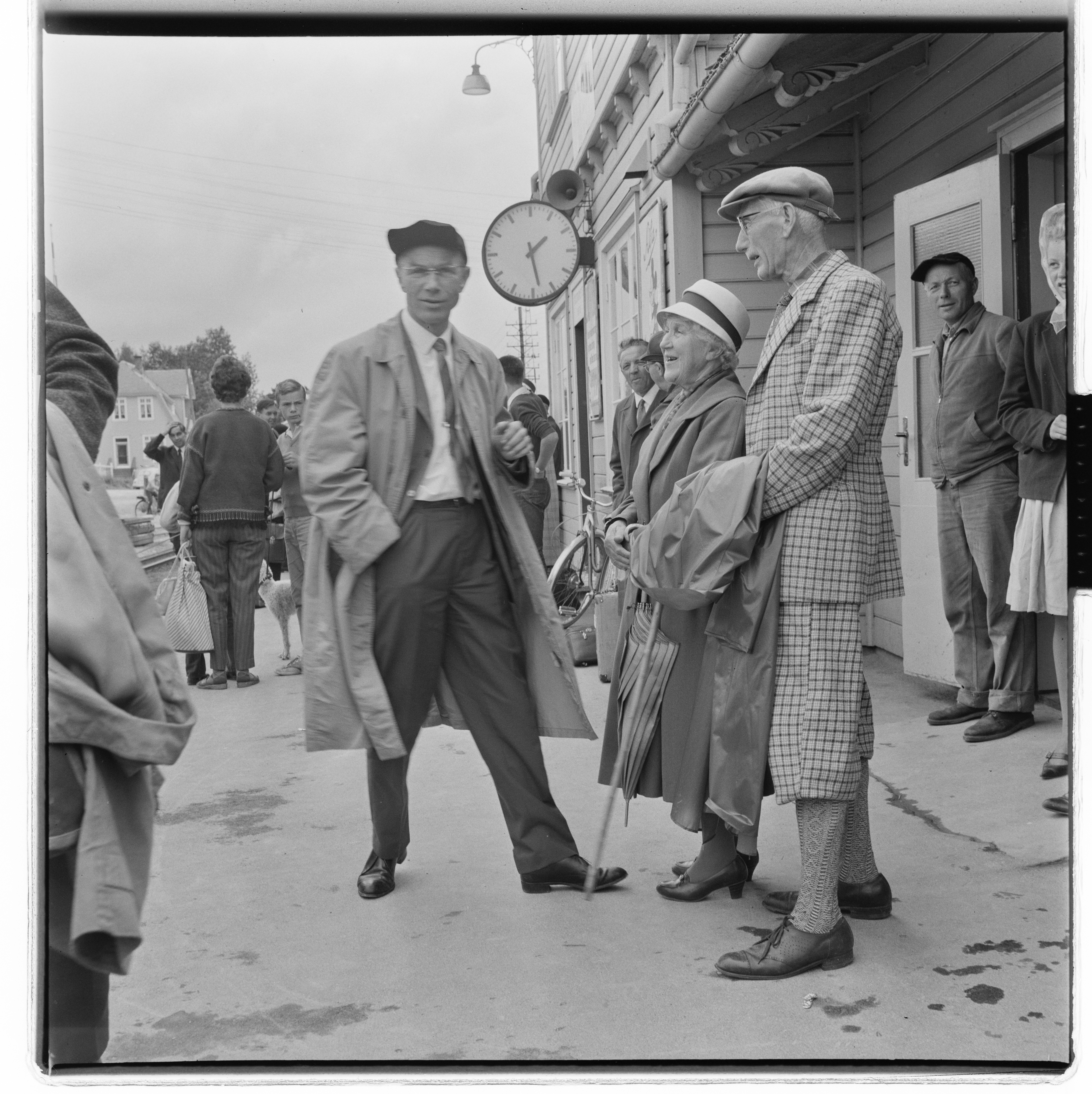 Bildet er hentet fra Arkivverket. Foto tatt i forbindelse med reportasje om den norske filmen Freske fraspark fra 1963. Manus var ved Kjell Aukrust og Bjørn Breigutu. Regi ved Bjørn Breigutu. Kjell Aukrust, Leif Juster, Turid Caldwell, Alfhild Hovdan, Per Bistrup, Lalla Carlsen Arkivinstitusjon : Riksarkivet Arkivnavn : Billedbladet NÅ Sted : Norge, Hedmark, Alvdal, Emneord: Film, Filminnspilling Avbildet